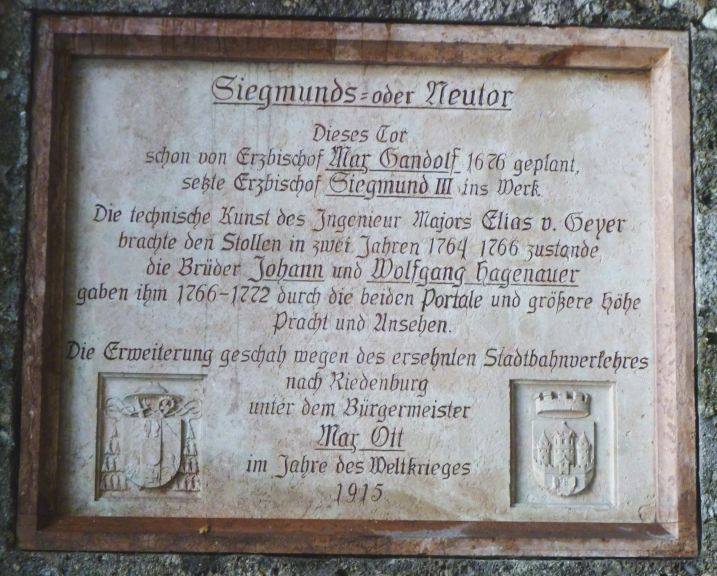 Sigmundstor (Salzburg) - Gedenktafel